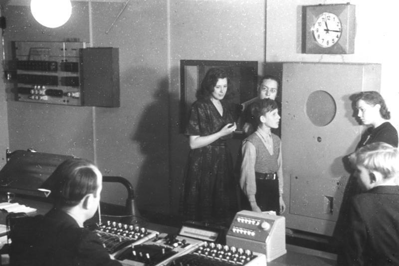 Der Schulfunk des Berliner Senders. Im Regieraum. Die auf Tonbändern aufgenommene Probesendung eines Hörspiels wird für die Mitwirkenden abgespielt. Fot. Schwahn-Illus 9.11.46 333-46